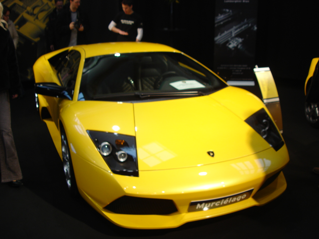 Lamborghini Murciélago LP640 in gelb